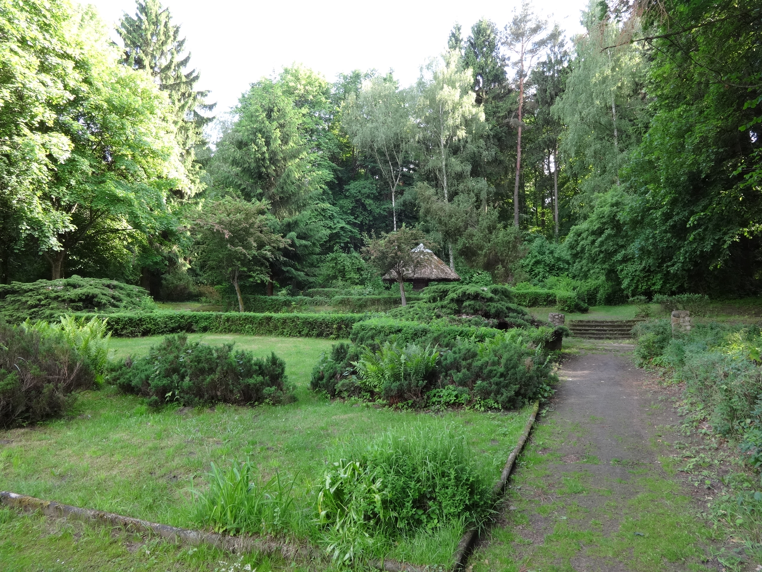 Lunapark im Buckow (Märkische Schweiz); eine Parkanlage am Buckowsee mit Zugang zum Eiszeitgarten, zur Ferdinandshöhe sowie zum Gummiweg